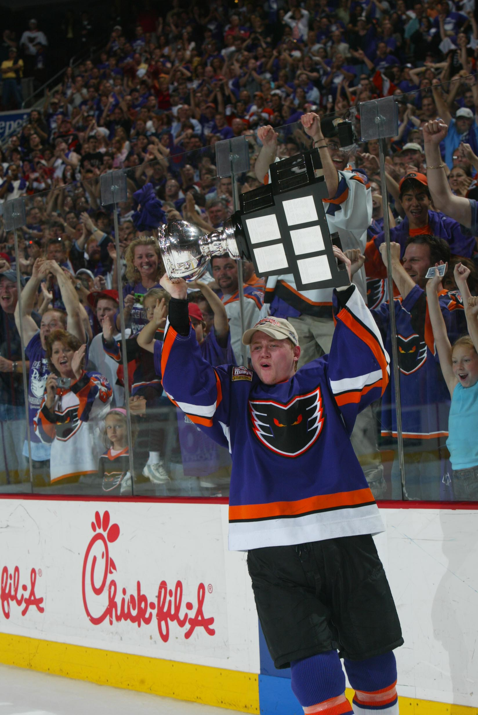 Photo: Bruce Bennett/AHL